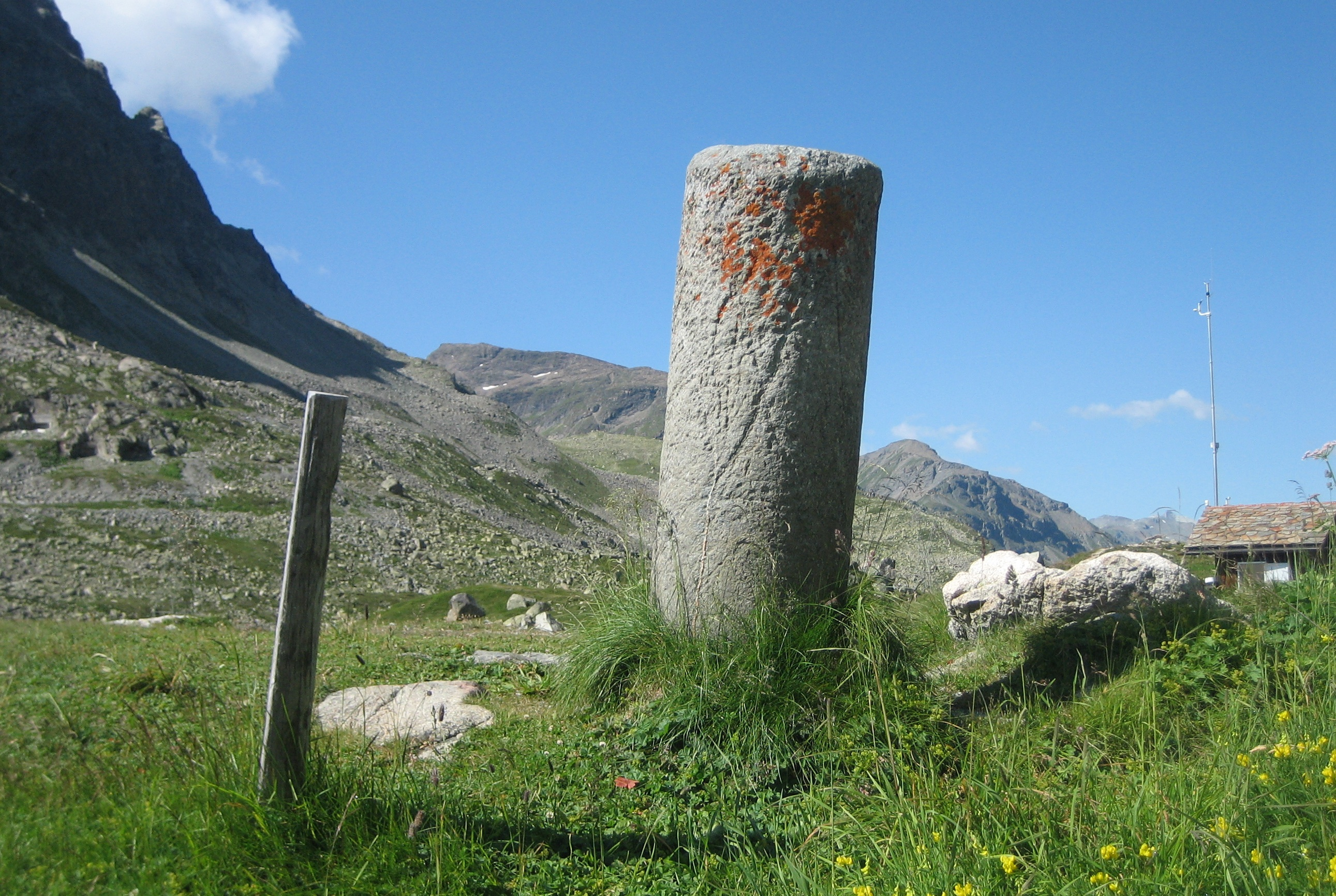 Römische Säule auf der Julierpasshöhe